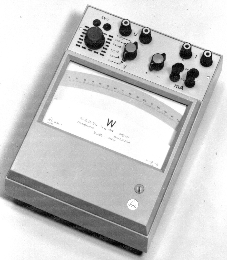 Fénymutatós wattmérő